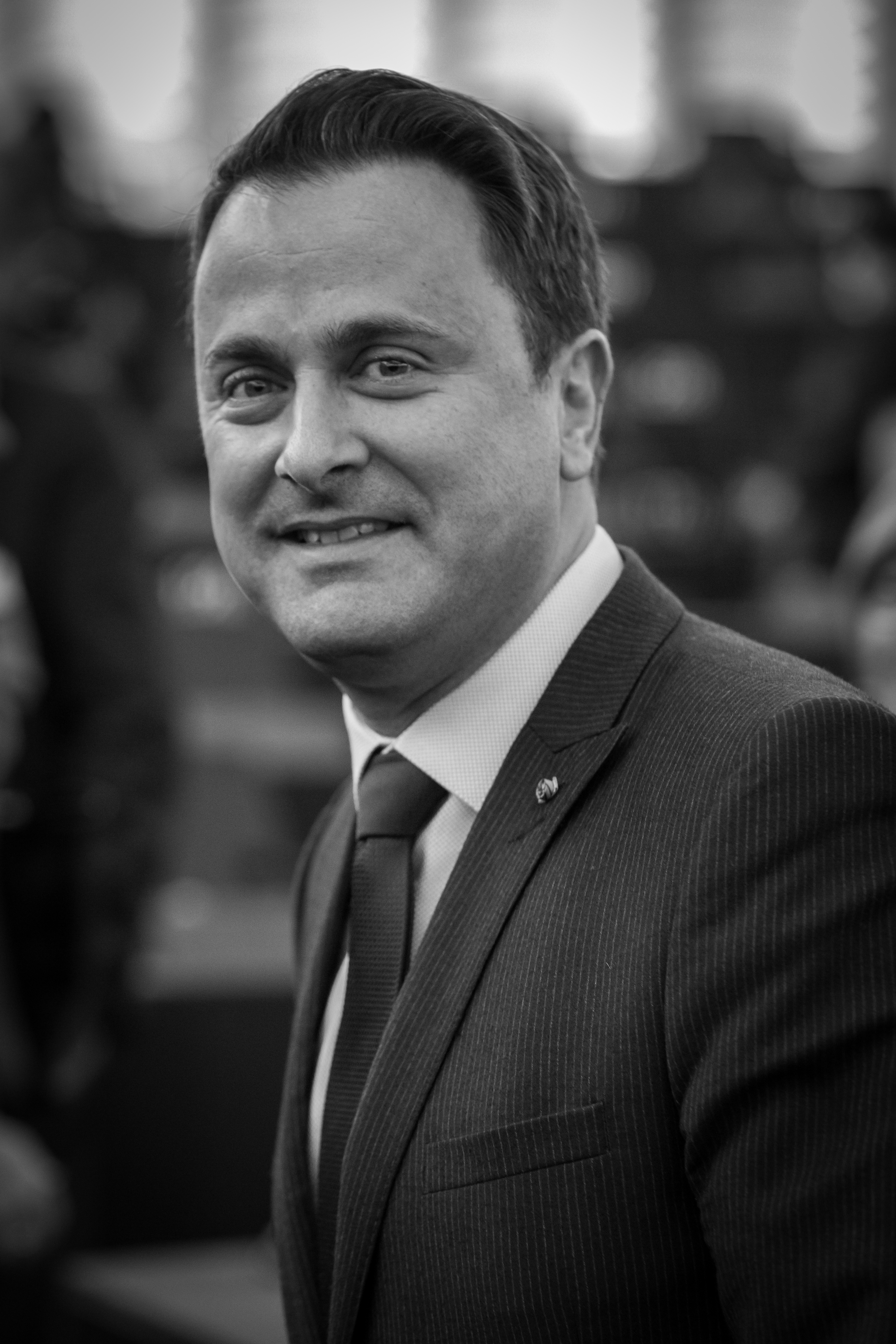 Xavier Bettel, né le 3 mars 1973 à Luxembourg (Bonnevoie), est un homme politique luxembourgeois.